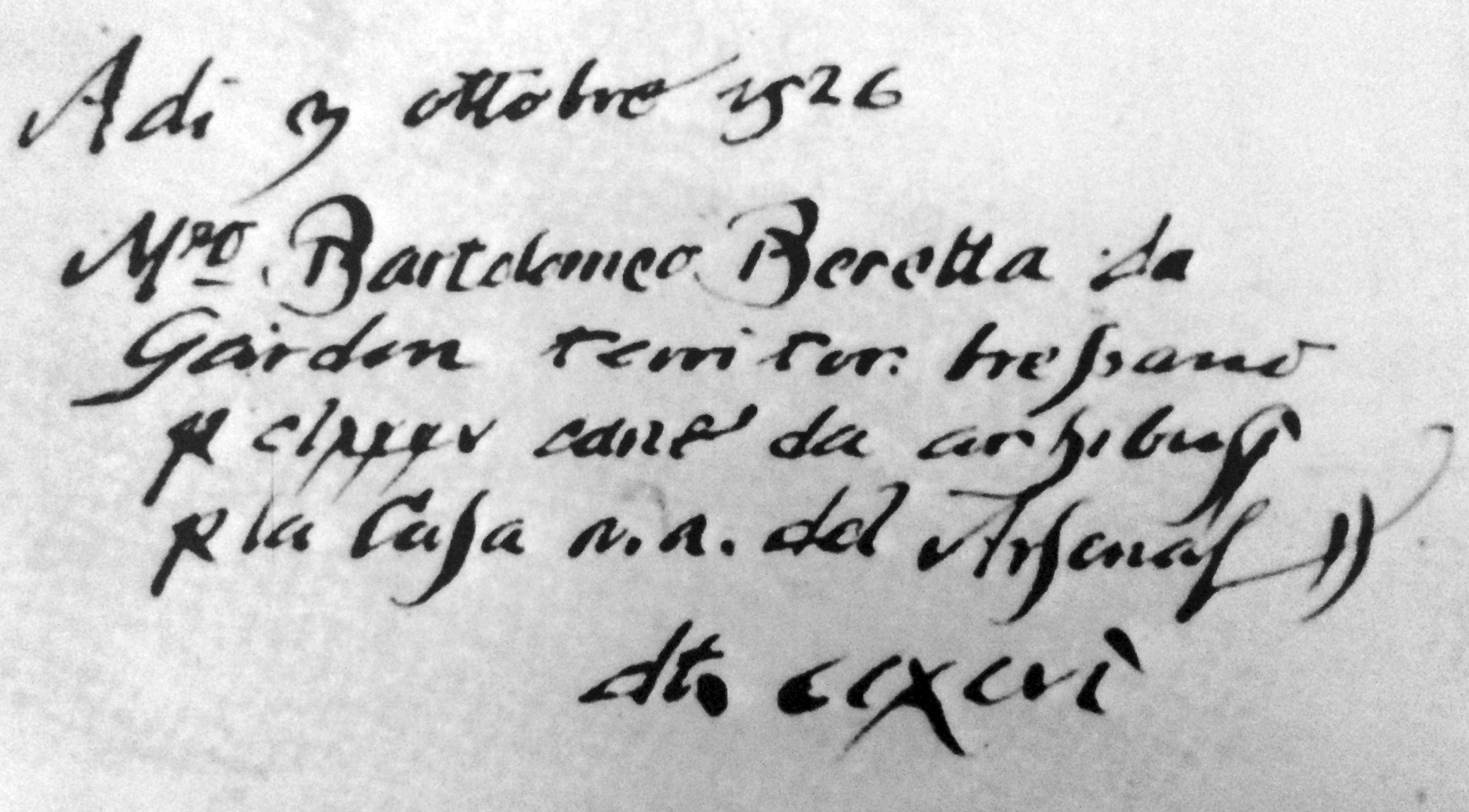 Ricevuta di pagamento al mastro Bartolomeo Beretta, dell'ordine per una fornitura di canne per archibugio alla Repubblica di Venezia. Il documento originale è conservato presso gli archivi della fabbrica Beretta a Gardone Val Trompia.